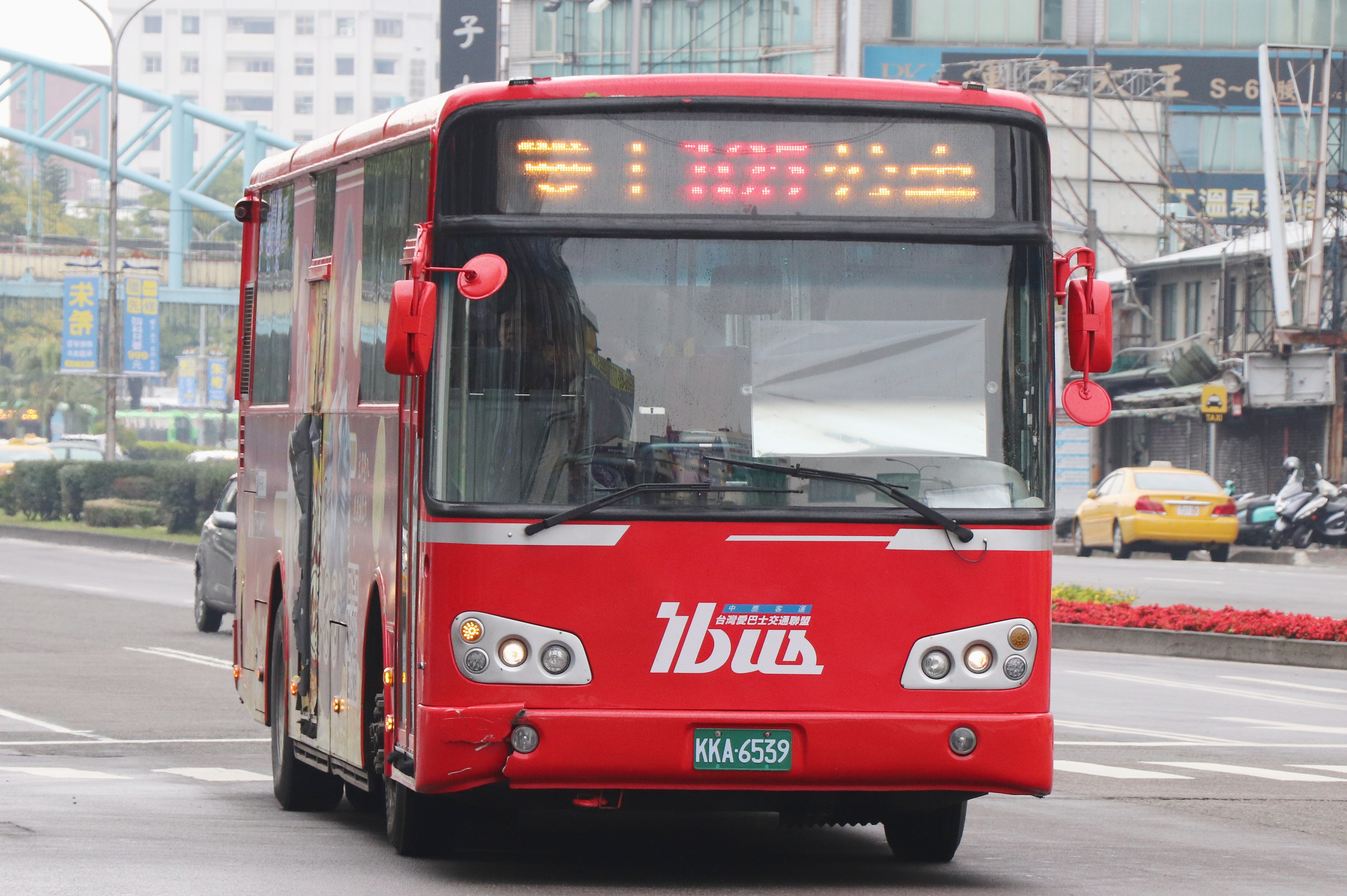 中鹿客運 大宇BC211MA大客車 KKA-6539